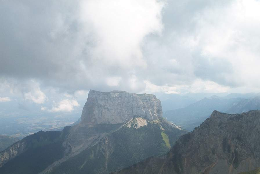 Le mont Aiguille, Massif du Vercors Aiguille Mount, Vercors Plateau, France Author : mbcmf217